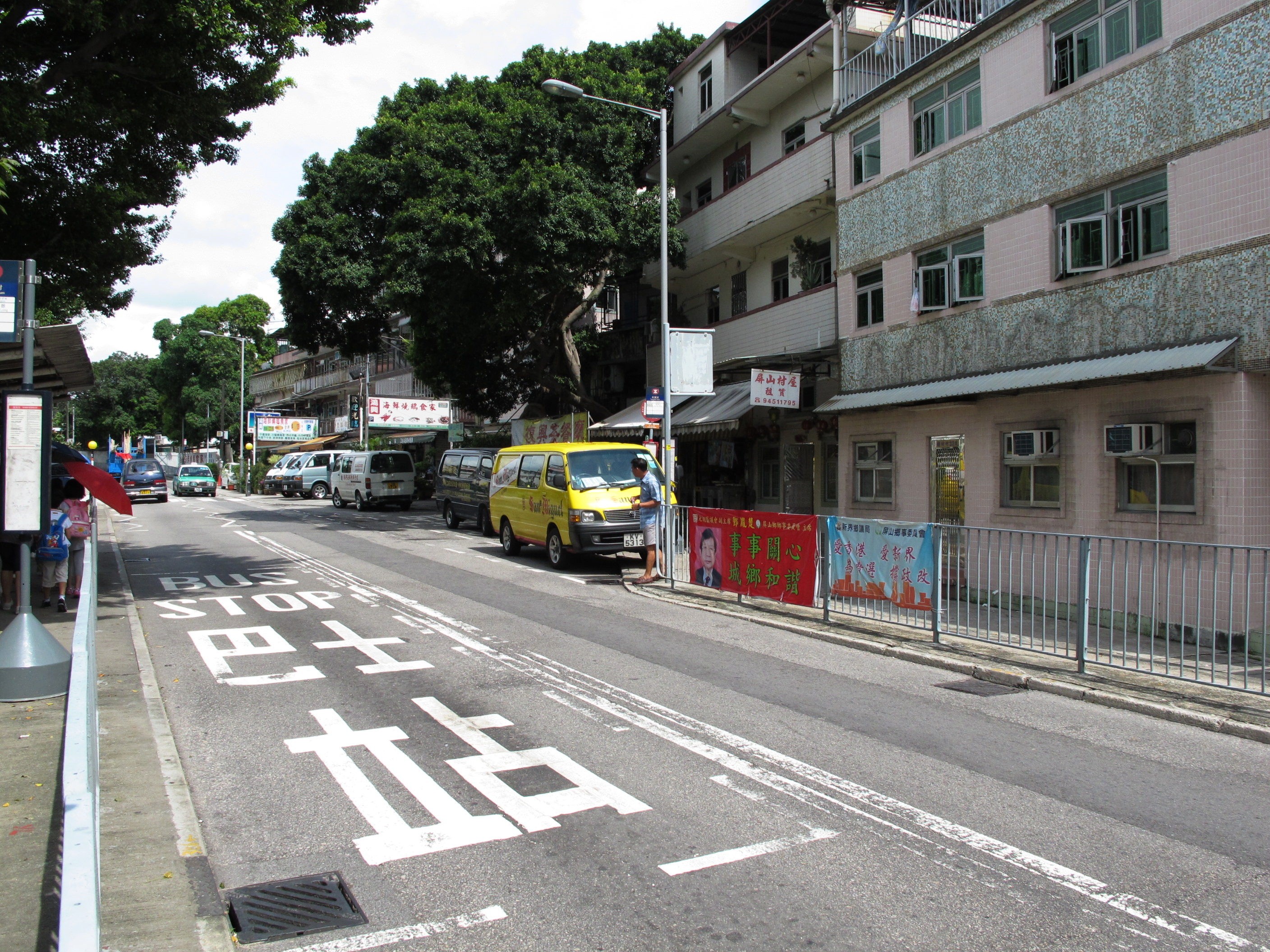 Ping Shan Ping Ha Road 屏山 屏廈路